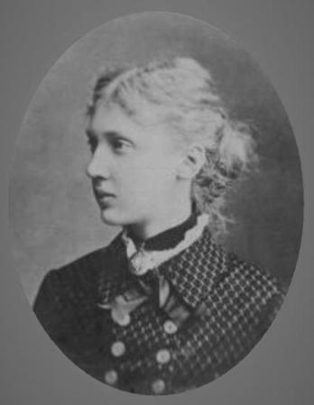 Maria Anna von Sachsen-Altenburg (1864-1918), Fürstin von Schaumburg-Lippe